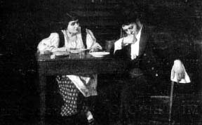 Fotogramma di Tresa, film muto del 1915, regia di Emilio Ghione (1879-1930), produz "Tiber Film", Roma, 1915, Attori: Fernanda Battiferri + Alberto Collo